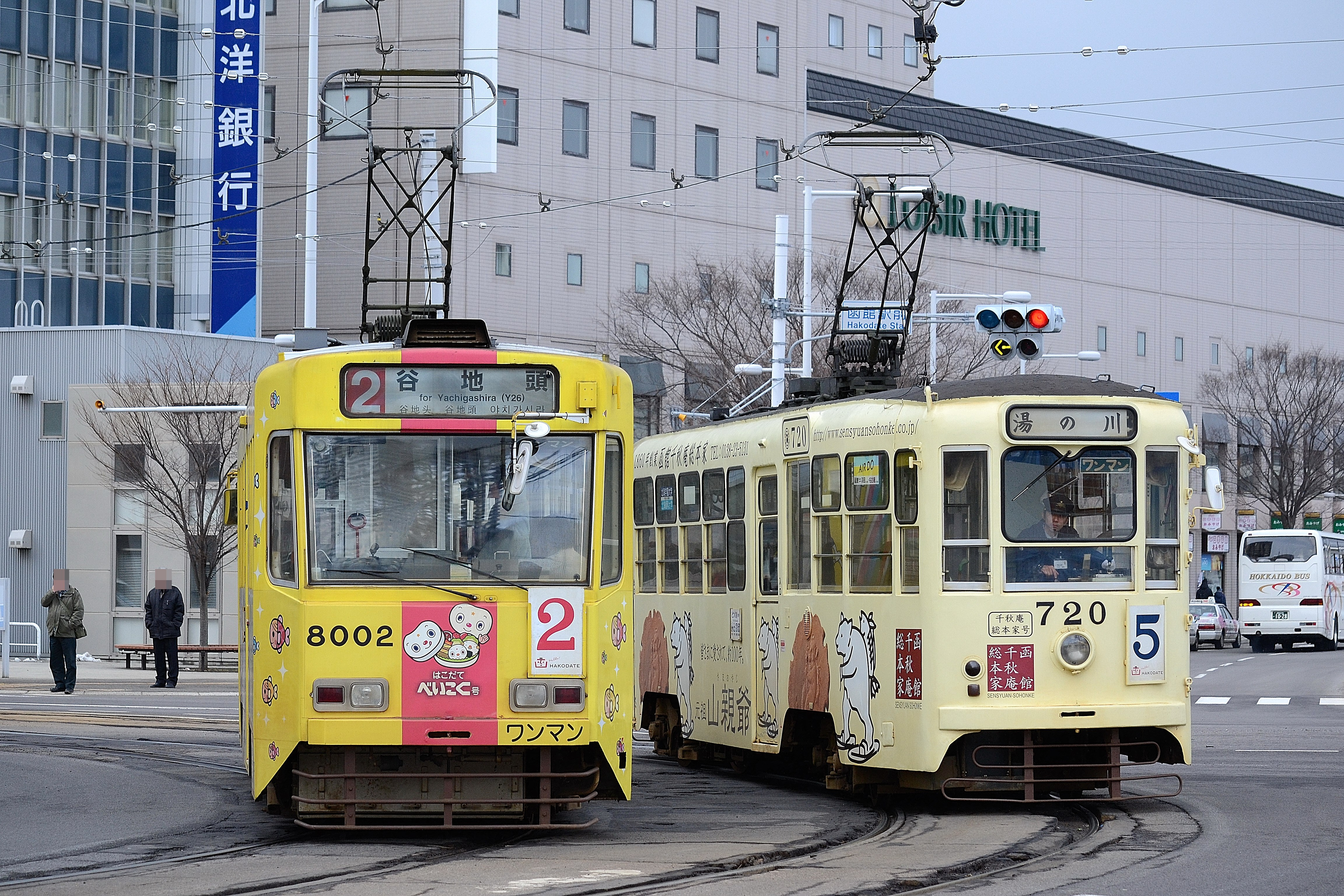 函館市交通局8000形電車8002号と函館市交通局710形電車720号